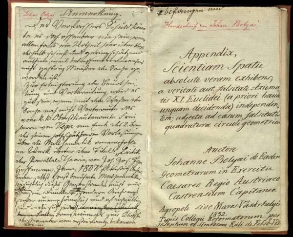 Bolyai János Appendix című művének egyik lapja